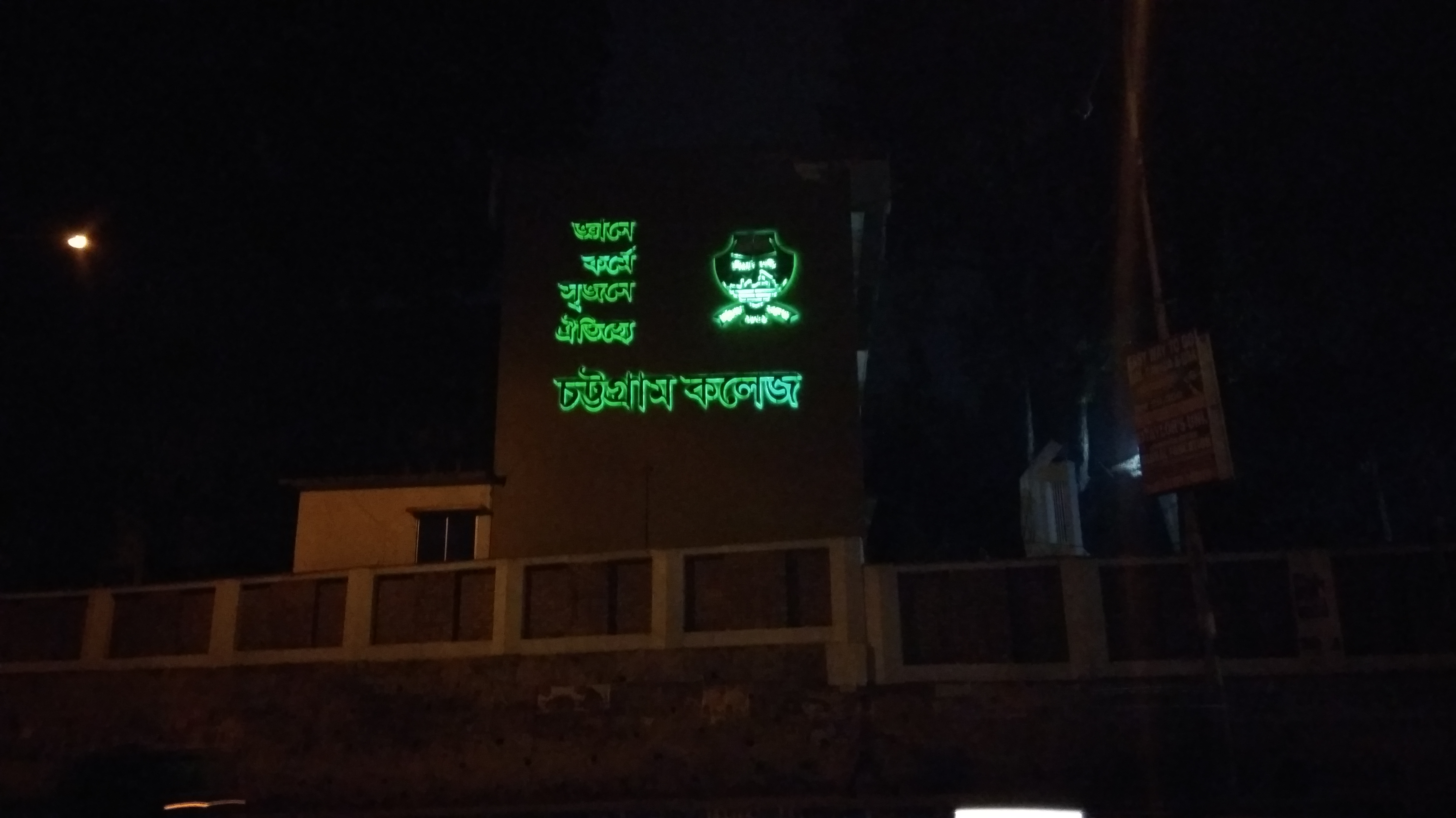 চট্টগ্রাম কলেজ